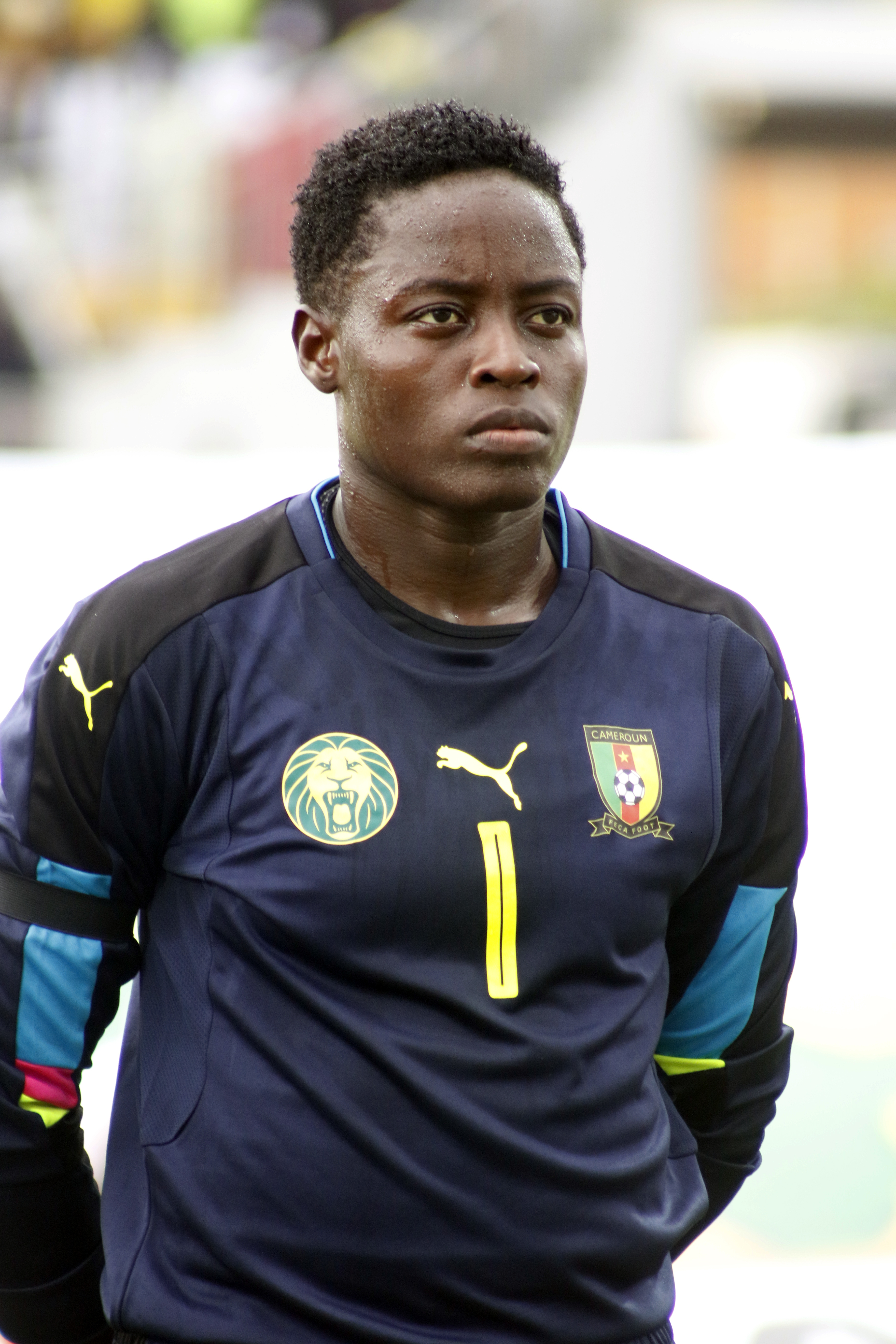 Gardienne de l'équipe nationale du Cameroun